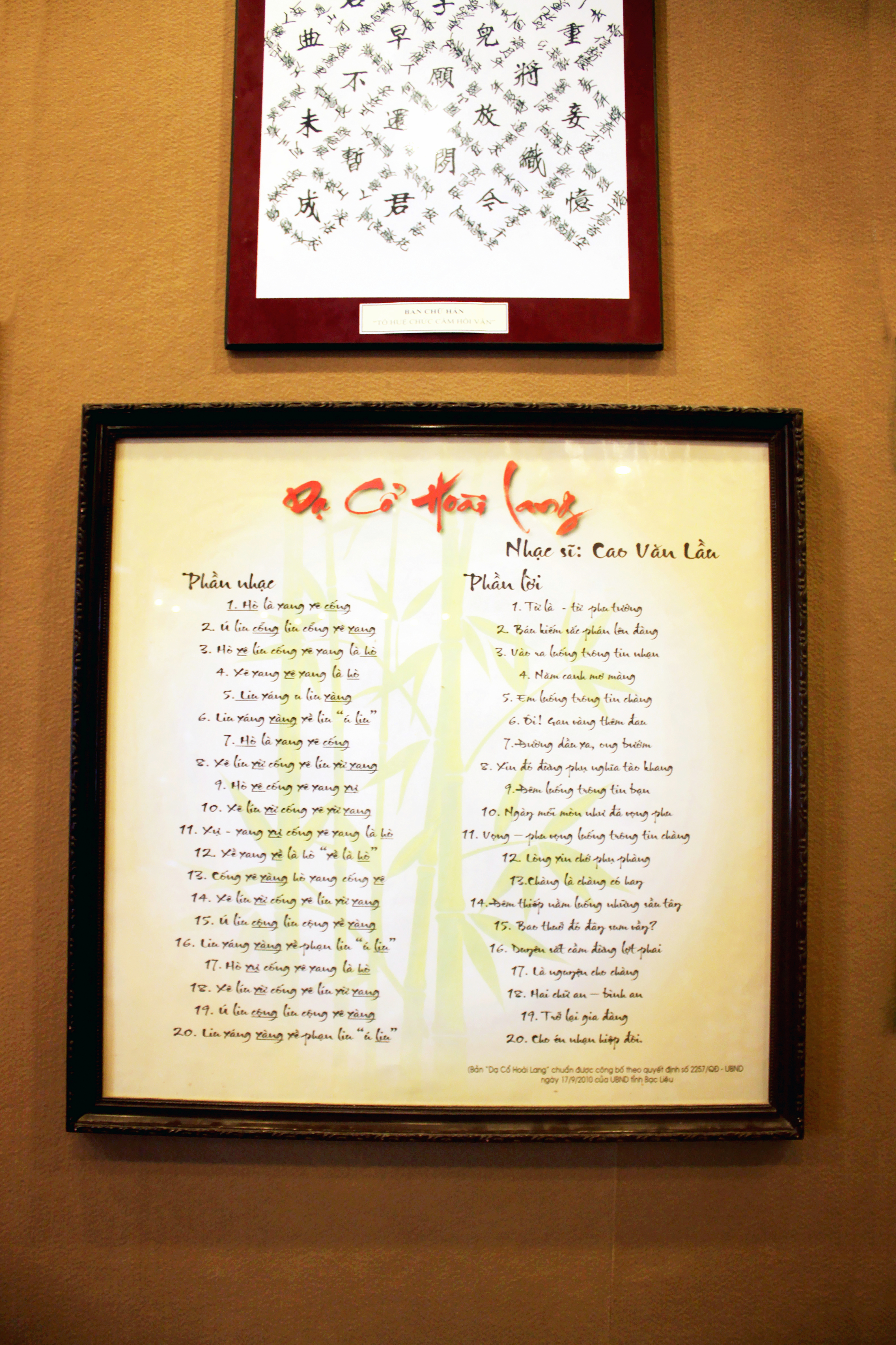 Bản Dạ cổ hoài lang do Cao Văn Lầu (1890-1938) sáng tác, được trưng bày trong Khu lưu niệm nghệ thuật Đờn ca tài tử và nhạc sĩ Cao Văn Lầu ở thành phố Bạc Liêu, tỉnh Bạc Liêu, Việt Nam.